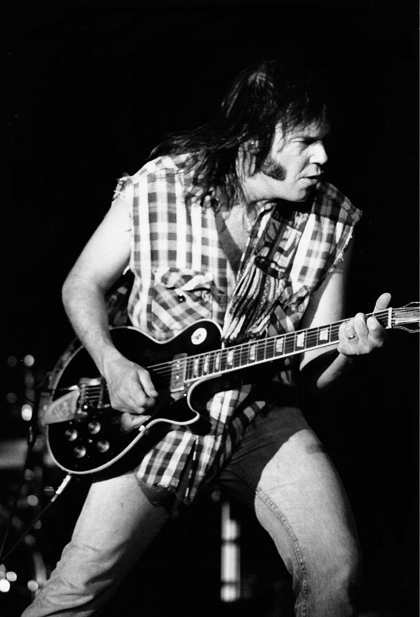 Palabras mayores. Photographer: F. Antolín Hernandez Concierto en Barcelona (no recuerdo el año), con Crazy Horse, por supuesto. Un derroche de pasión y energía. Camara: Olympus OM2 Objetivo: OM 135mm 2.8